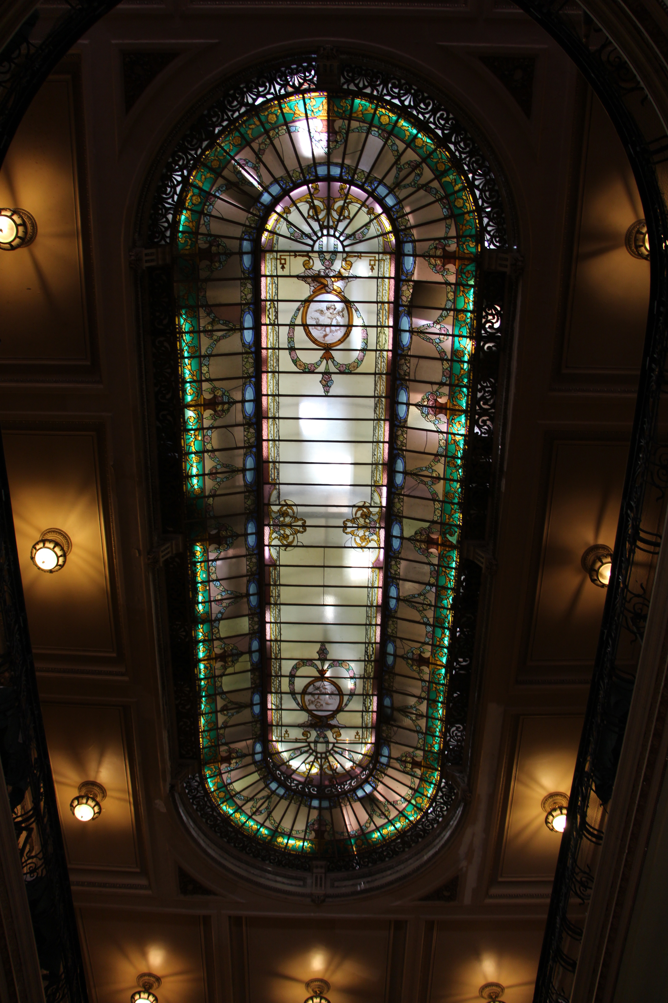 Rio de Janeiro